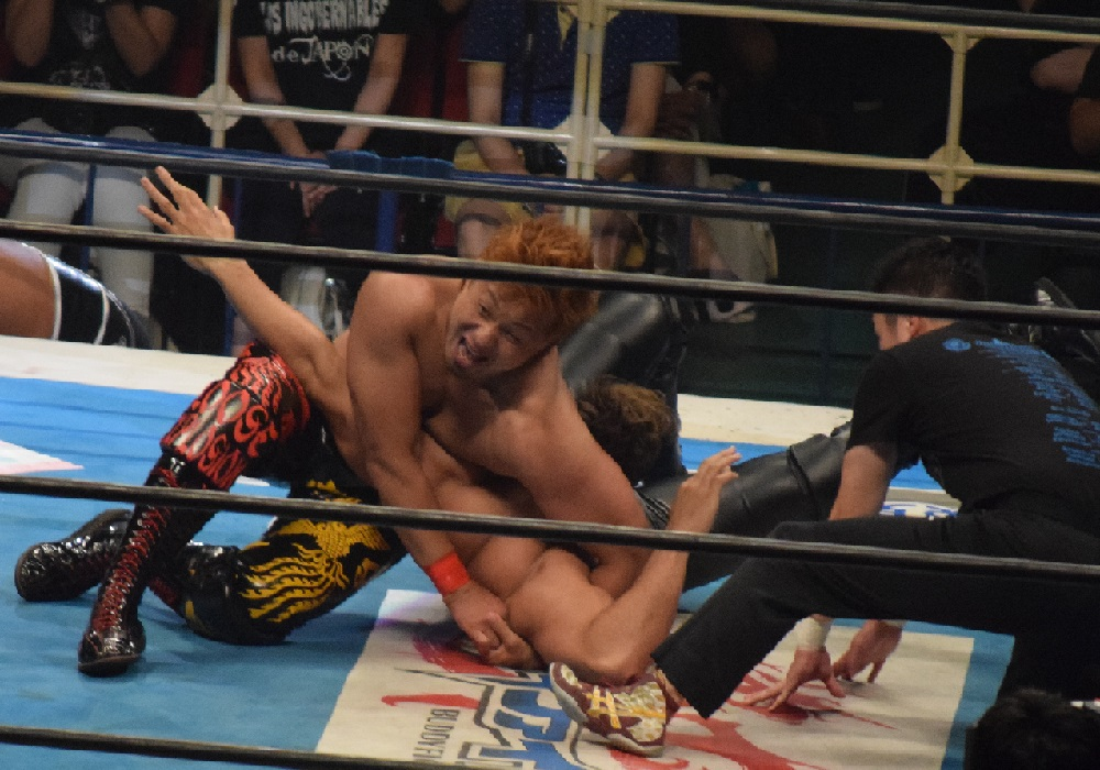 2016年6月19日 大阪城ホール 「DOMINION 6.19 in OSAKA-JO HALL」 SANADAにバタフライロックを極めるYOSHI-HASHI